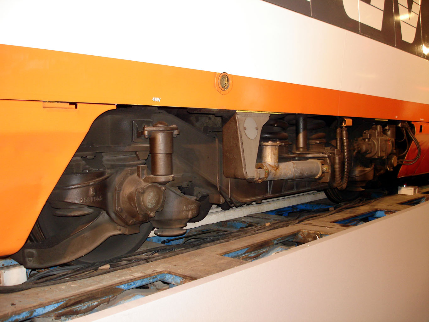 Bogie arrière de la motrice de la rame 16 du TGV Sud-Est, détentrice du record mondial de vitesse du 26 février 1981 à 380km/h Nef du Grand Palais à Paris, France Date: 2007-12 Photo personnelle (own work) de Clicsouris